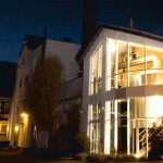 Sudhaus der Brauerei bei Nacht